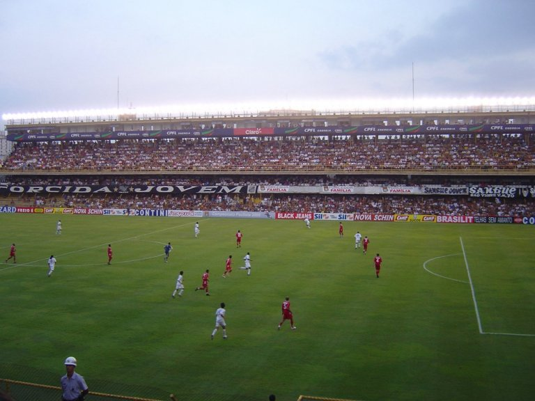 Imagem Estádio Urbano Caldeira(Vila Belmiro)-Santos FC 2 X 0 Mogi-Mirim-Paulista 2006